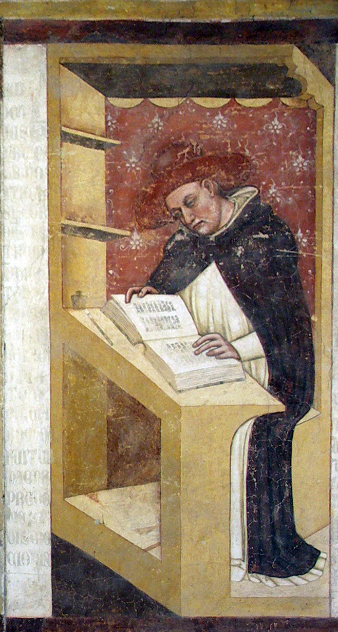 Nicolò Alberti, serie dei Quaranta domenicani illustri, ex convento di San Niccolò, Sala del Capitolo, Treviso, 1352 (altezza di ciascun ritratto 150 cm circa)